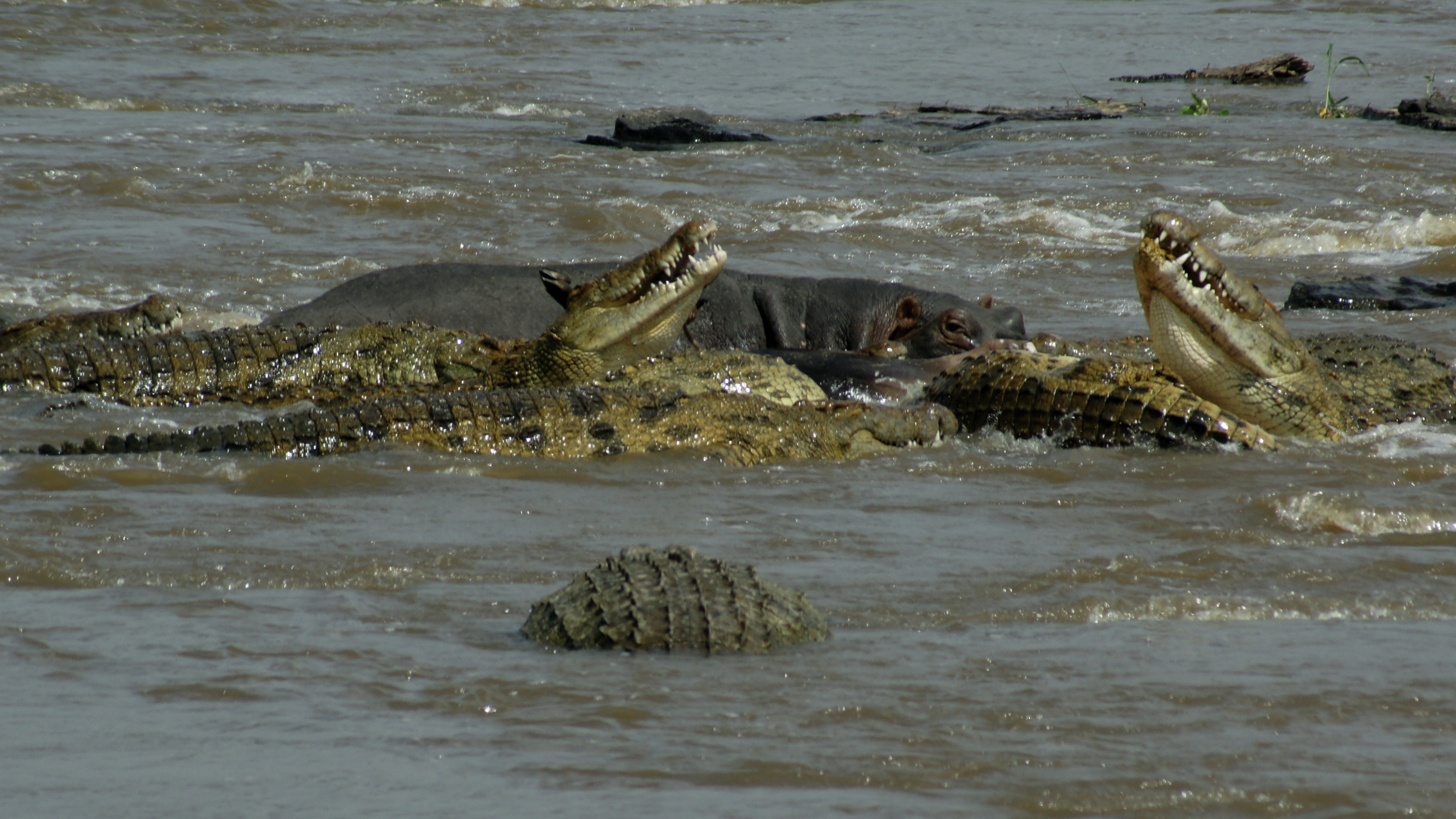 Maasai Mara - 152